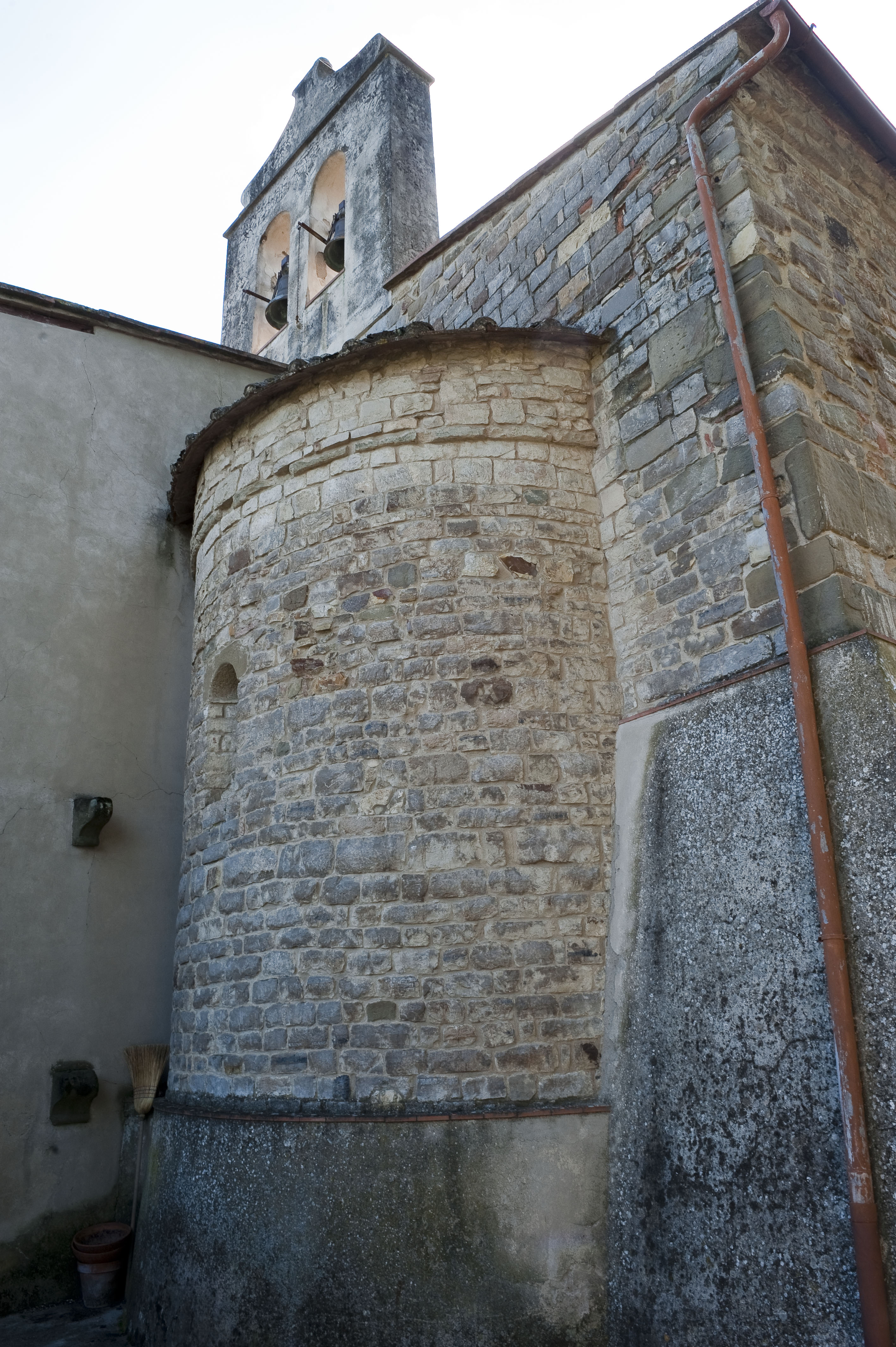 Abside della chiesa di San Paolo a Mosciano (Scandicci)